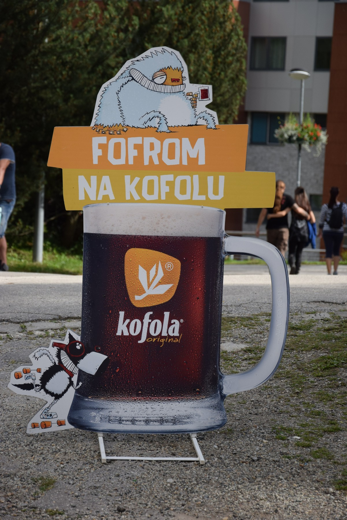 Reklamný pútač Kofola, leto 2016